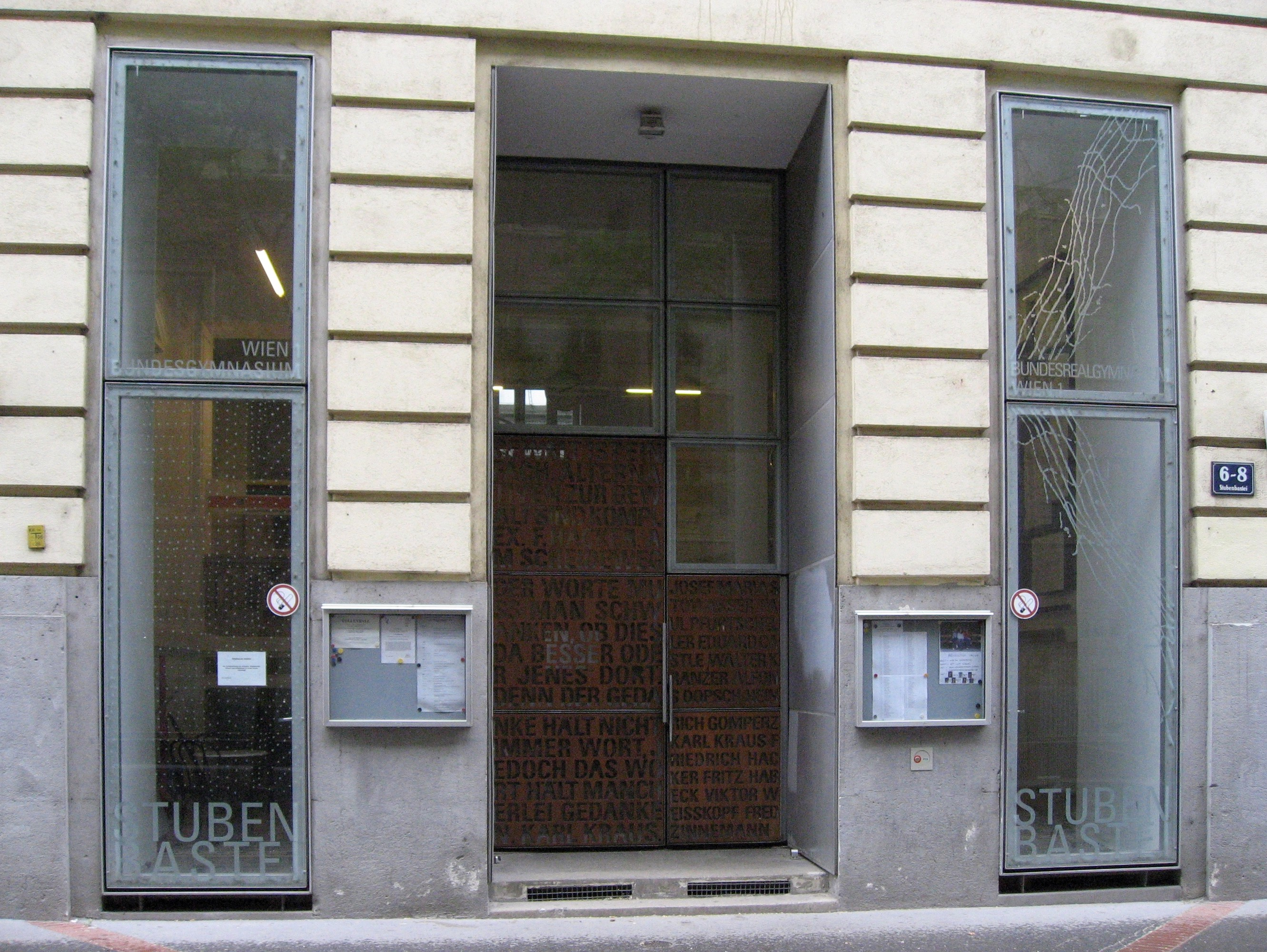 Gymnasium Stubenbastei in Wien